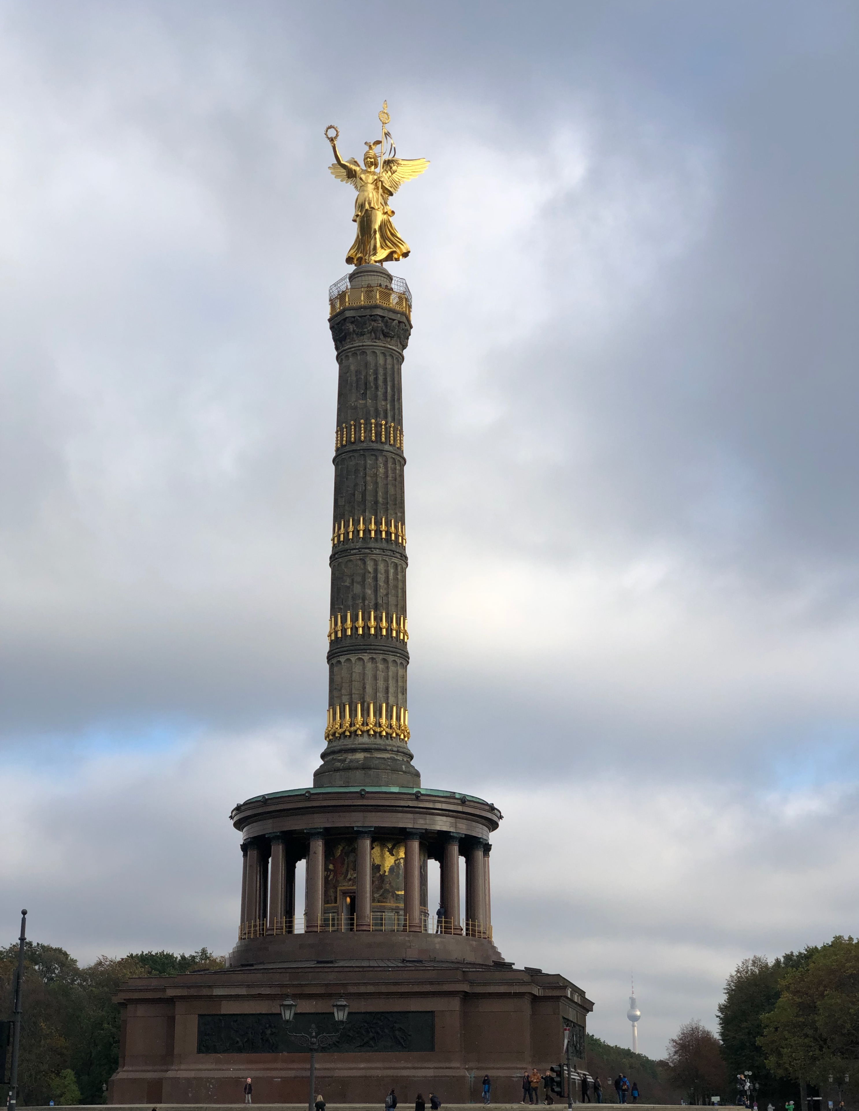 Колонна Победы